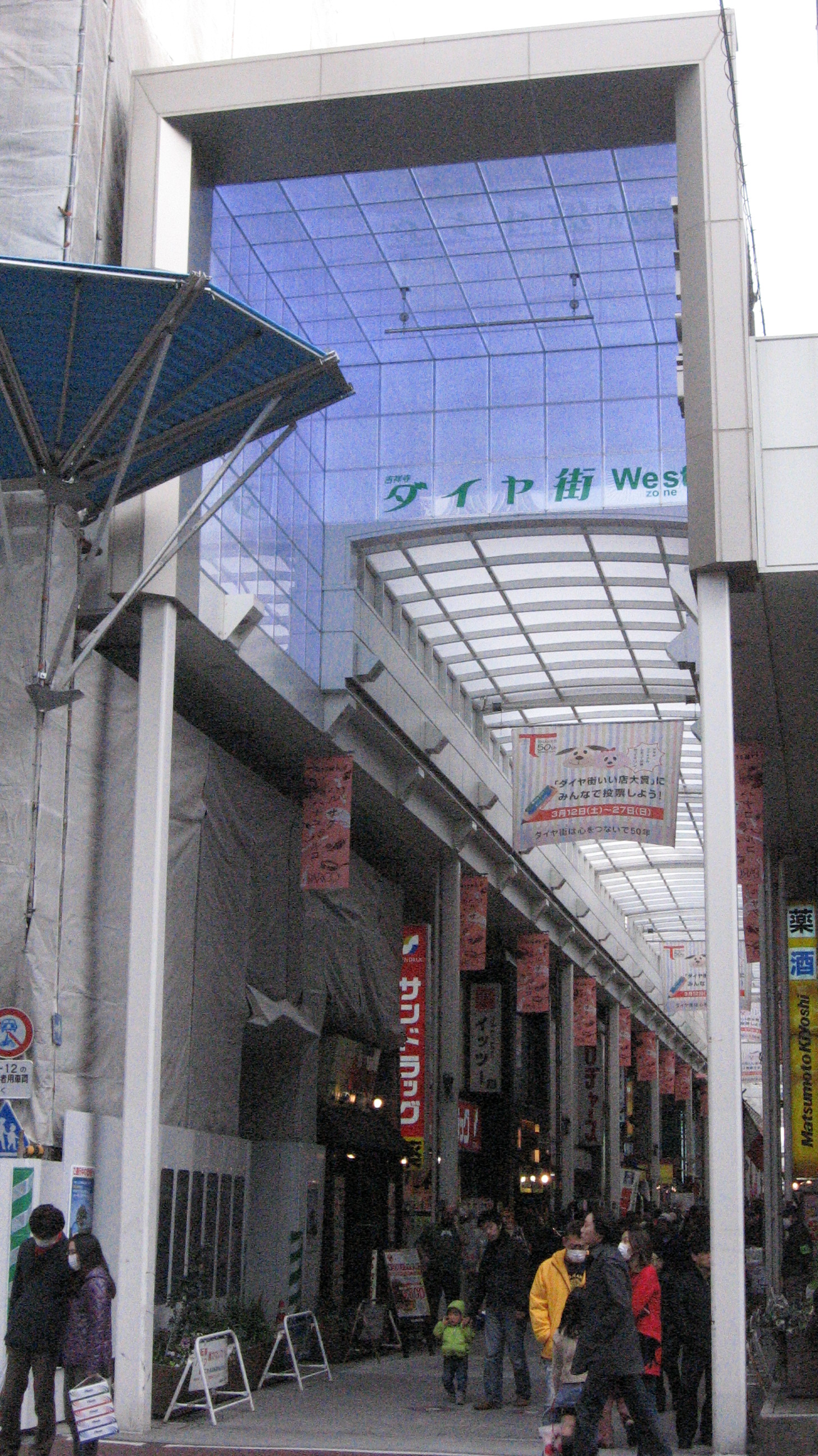 Kichijoji "Dia-gai" Arcade West zone.